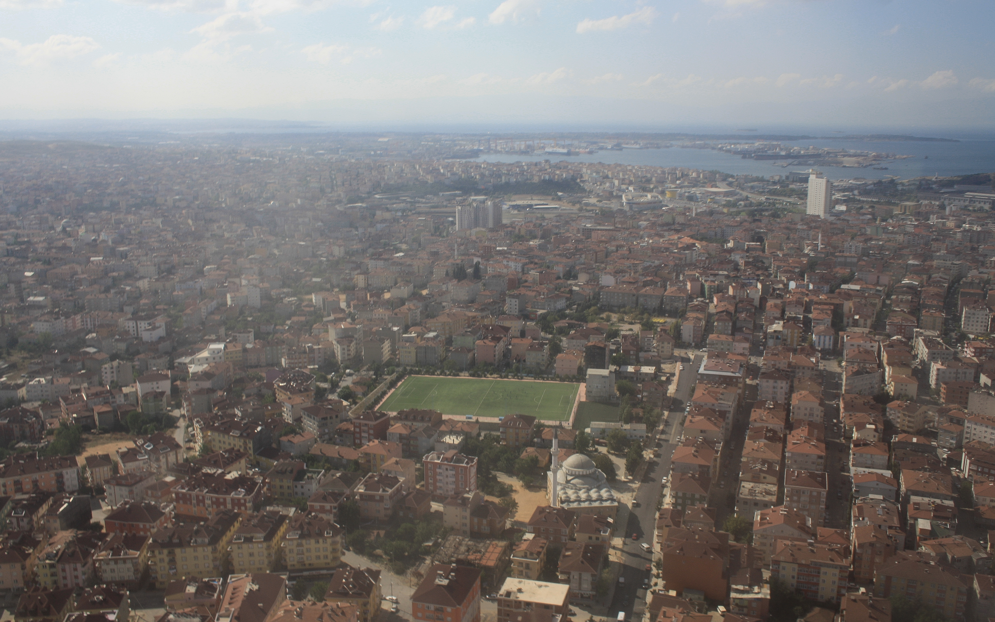 Pendik Stadının havadan görünüşü